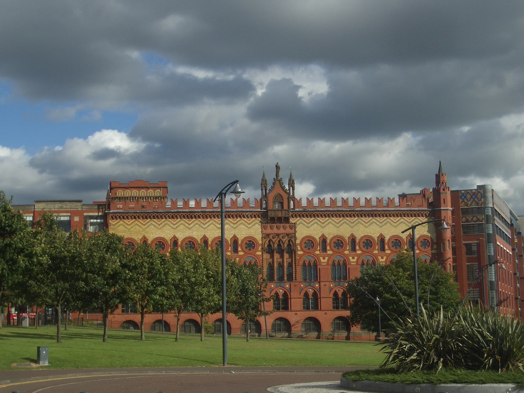 Templeton-Teppichfabrik, Glasgow